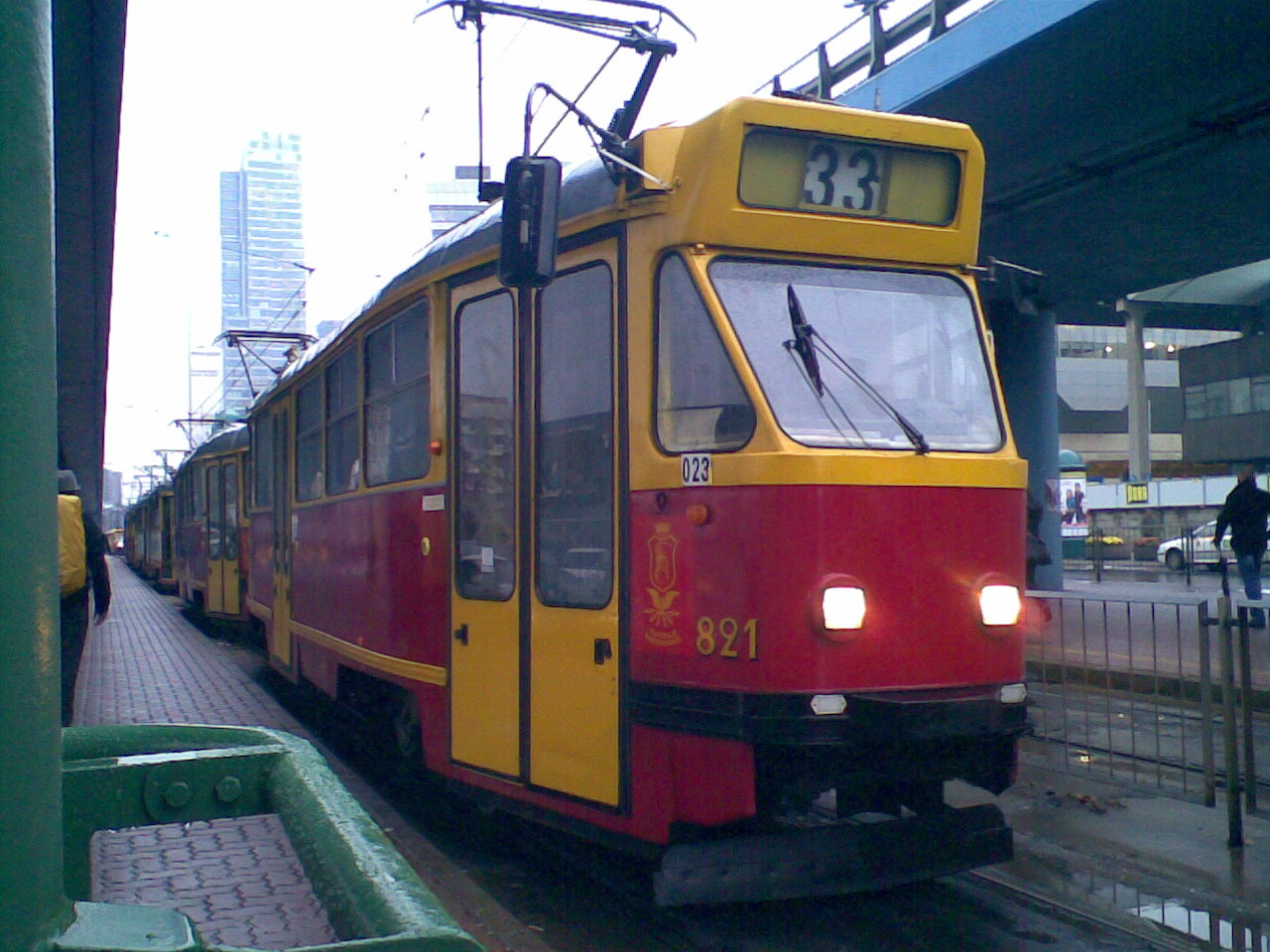 Zmodernizowany skład 13N 818+821 w Warszawie